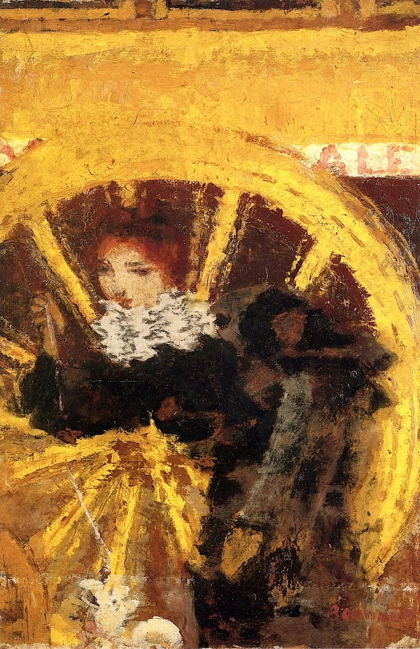 L'Omnibus